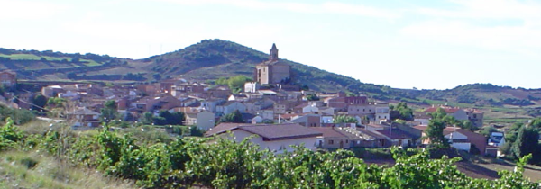 Vista de la población Española de Ventosa (La Rioja)